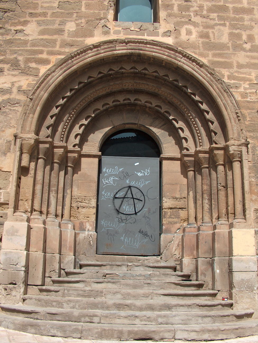 Igreja de San Martín. Igreja de San Martín em Lérida, Espanha.